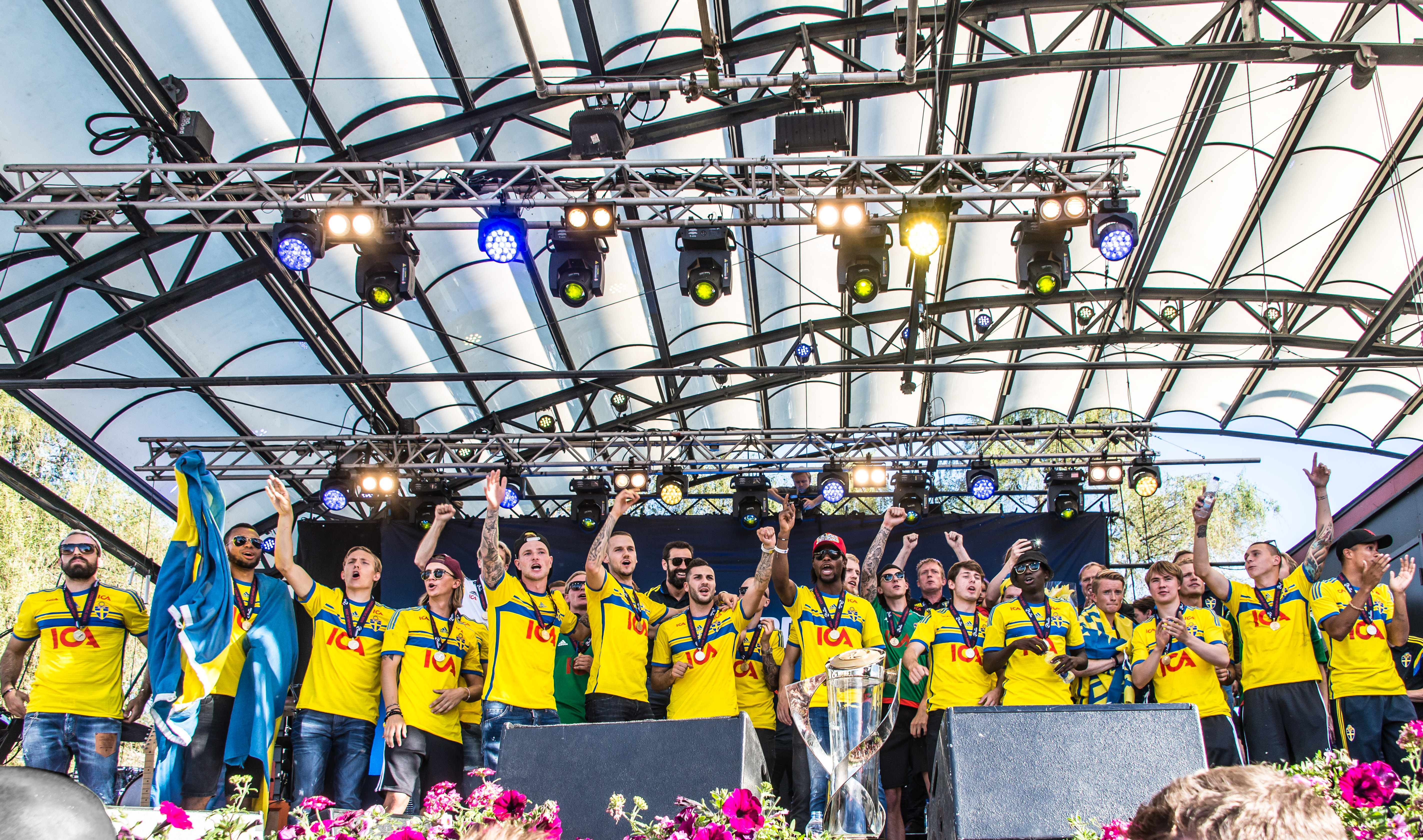 Sveriges U21-landslag blir firad i Kungsträdgården i Stockholm den 1 juli av 1000-tals fans efter guldet i U21-Europamästerskapet i fotboll 2015.